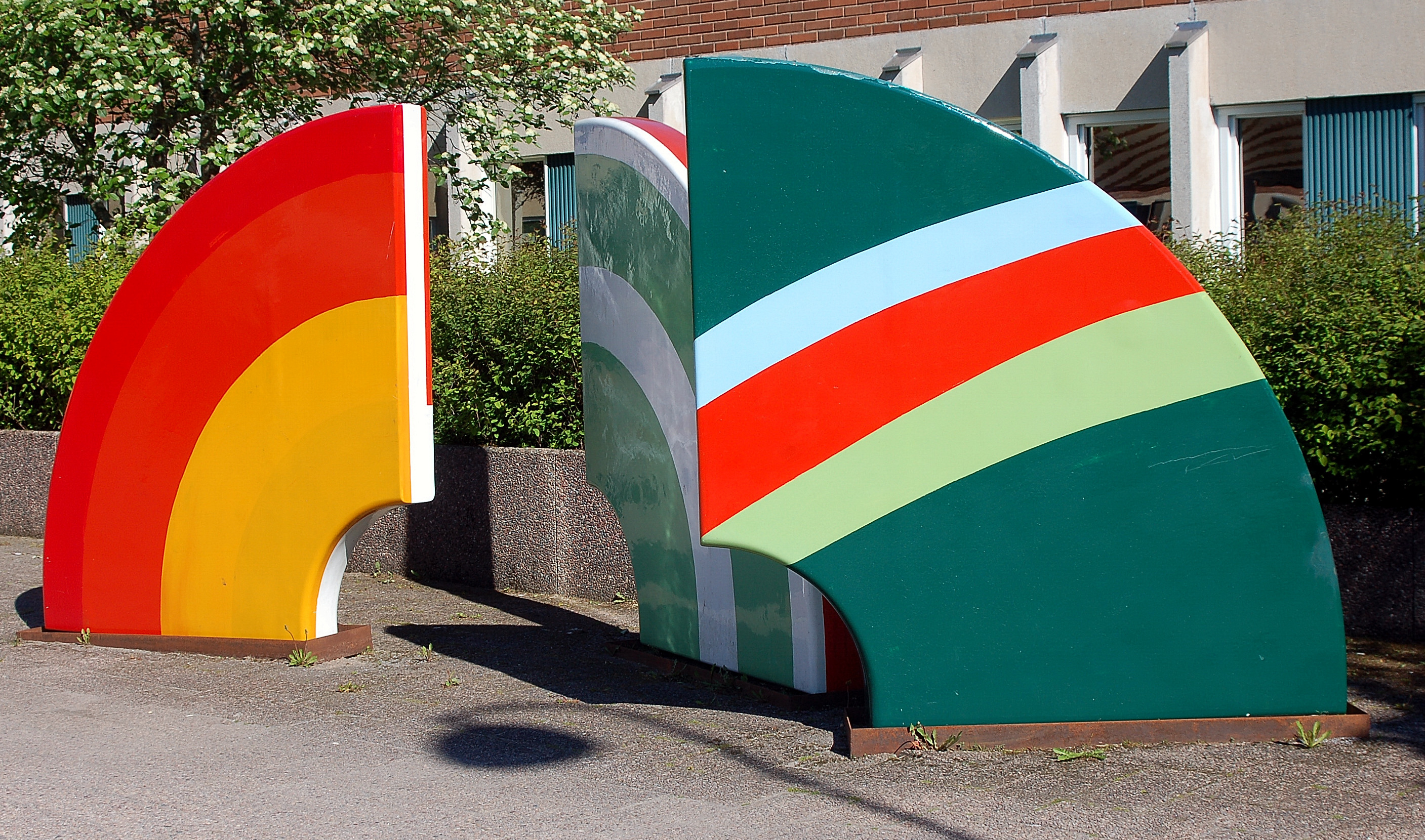 "Cirkelsegment av Göran Danielsson från 1974 placerade utanför Karlskoga Lasarett.